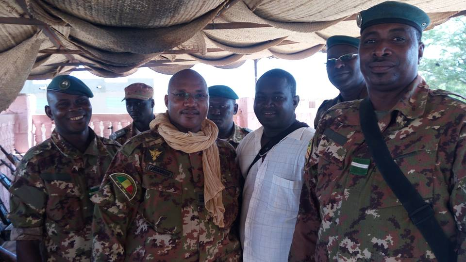 En images : découverte d'un lot d'armes dans la ville de Tombouctou au Mali 08 septembre 2016 À Tombouctou, au Mali, les autorités ont fait part de la découverte d’un important lot d’armes de guerre et de munitions. Cette découverte a été rendu possible grâce au concours de la population locale qui a informé la gendarmerie de la ville, d’un mouvement suspect au niveau d’un bâtiment inhabité. Après une semaine d’enquête, les gendarmes ont trouvé un véritable arsenal de guerre.